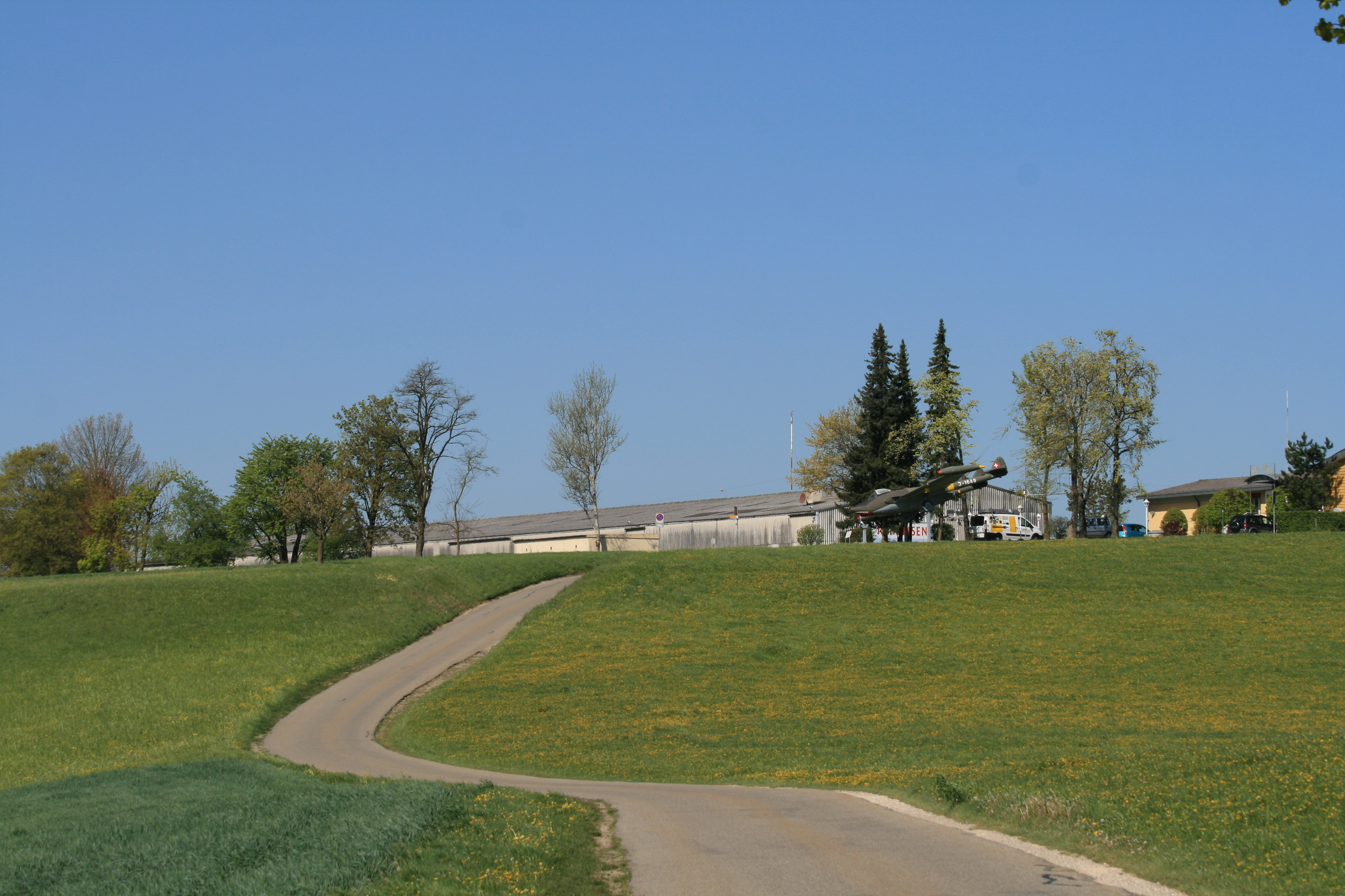 Flugplatz Fricktal-Schupfart, Schupfart